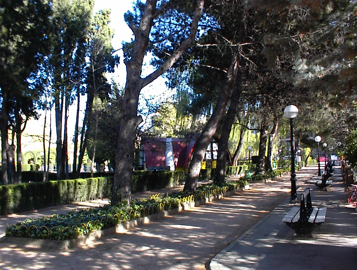 Huesca, parque Miguel Servet.